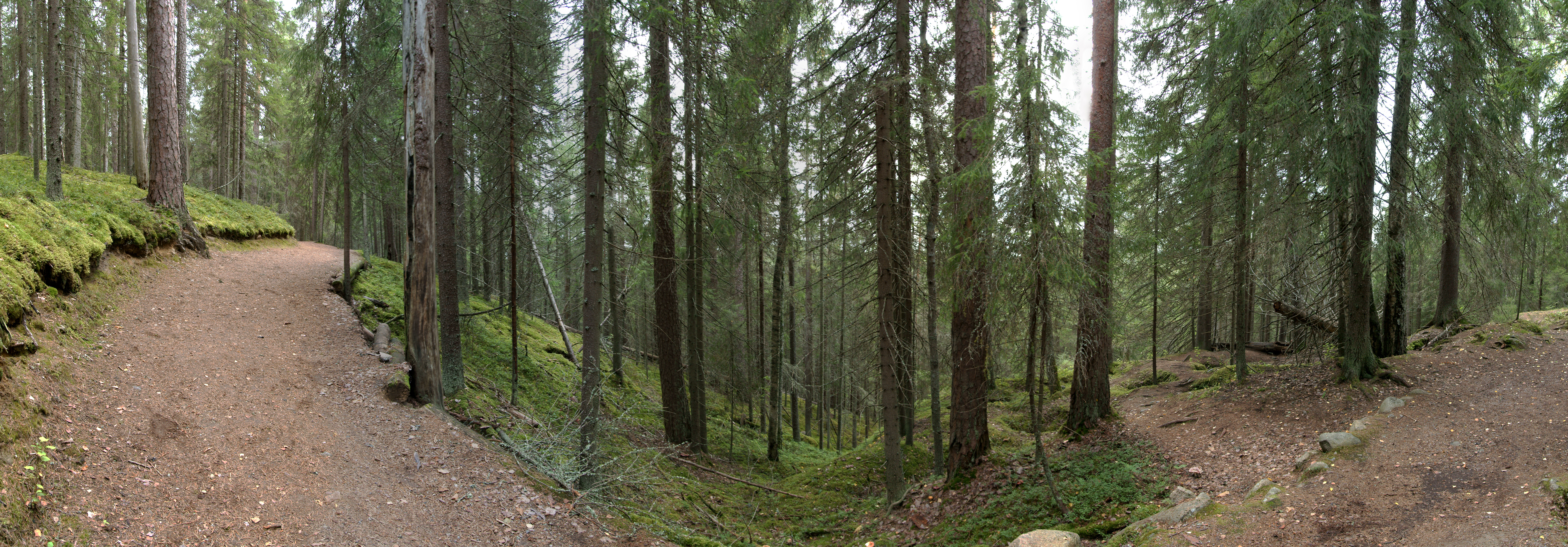 Kuva Multiharjun kävelypolulta Seitsemisen kansallispuistossa.